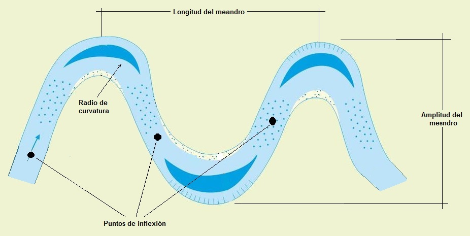 Geometria de un meandro